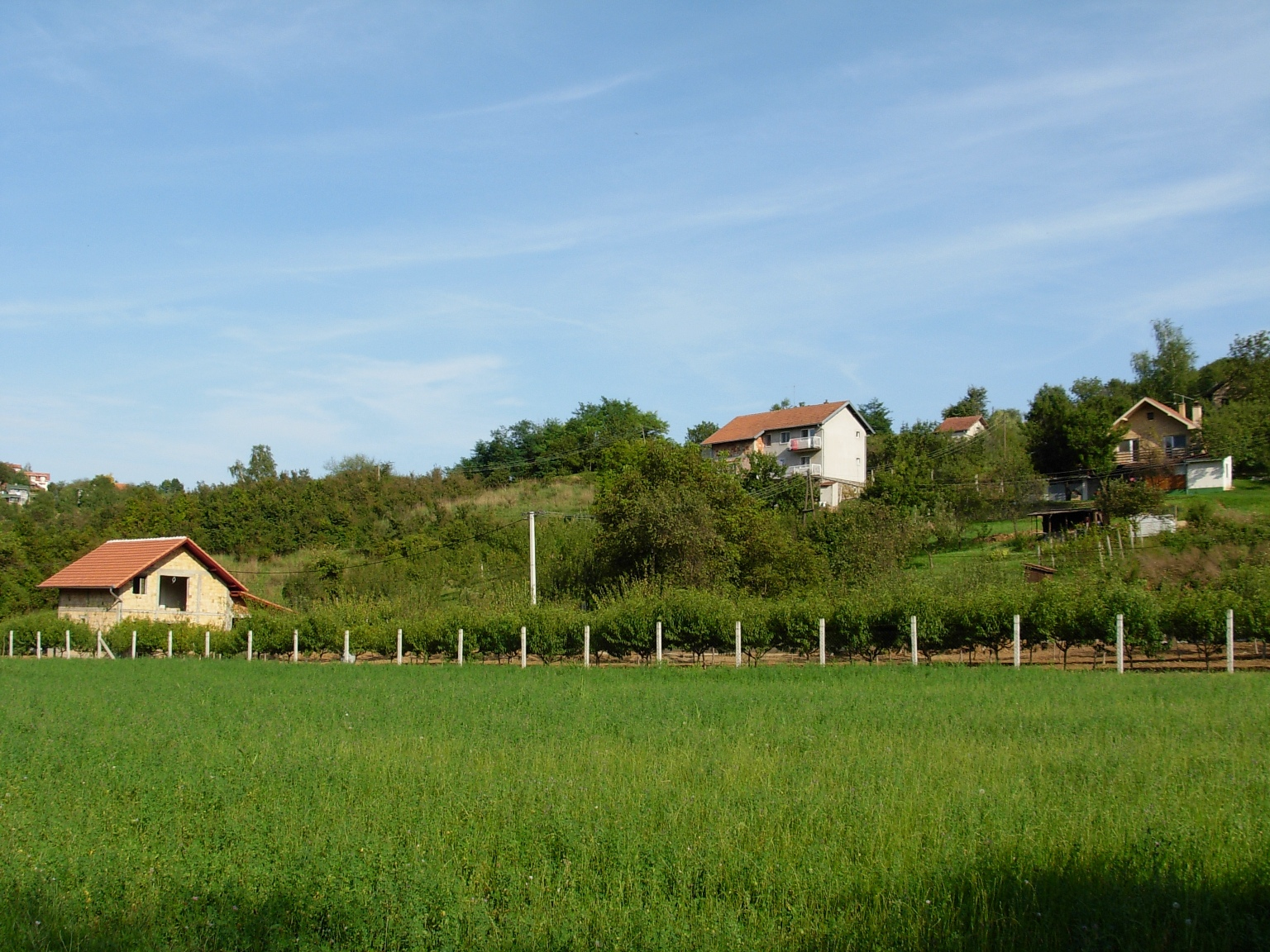 Kuće u Maloj Kamenici.